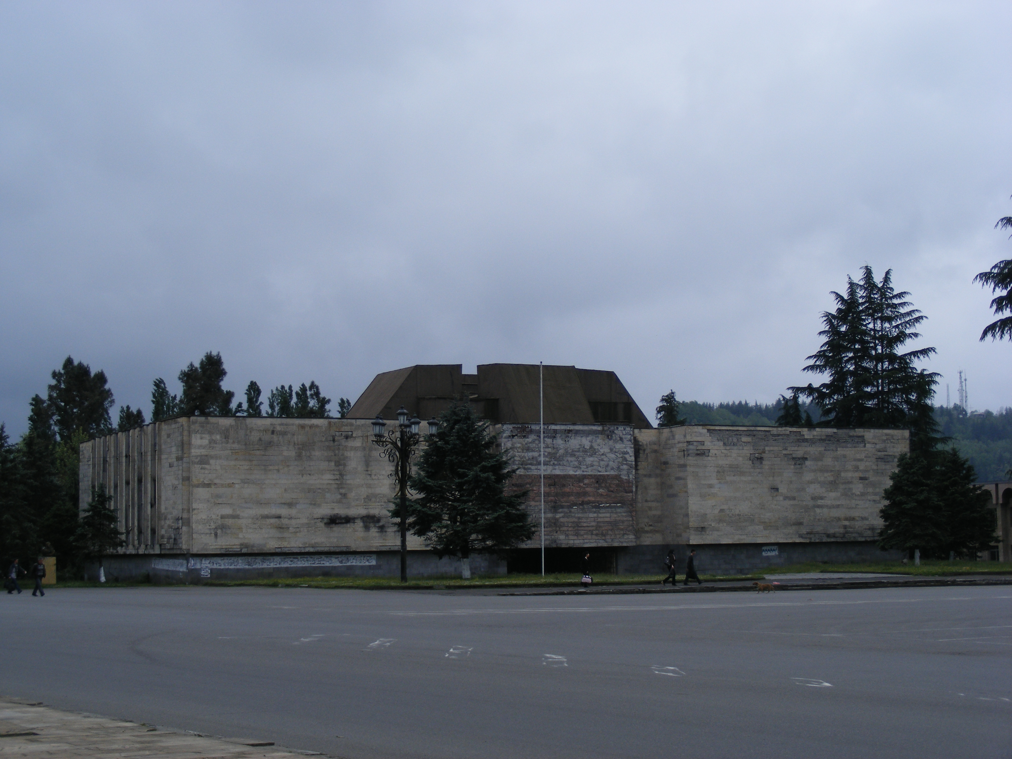 Ozurgeti